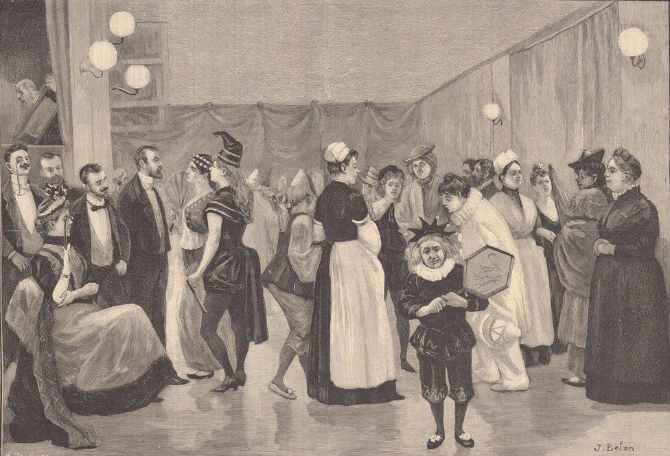 Le bal des folles à la Salpetrière.